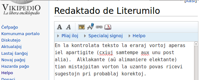 Ekzemplo pri literumado de Vikipedia redakto